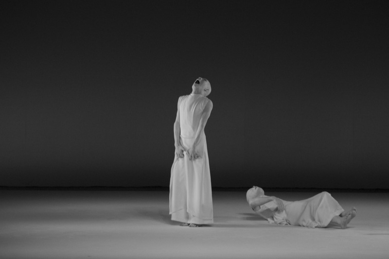 Espectáculo presentado en el Festival Cervantino llamada Kagemi: Más allá de la metáfora de los espejos, Sankai juku pertenece a la segunda generación de los grupos de la danza Butoh, movimiento que emergió en los años setenta como una expresión crítica de la conciencia humana.